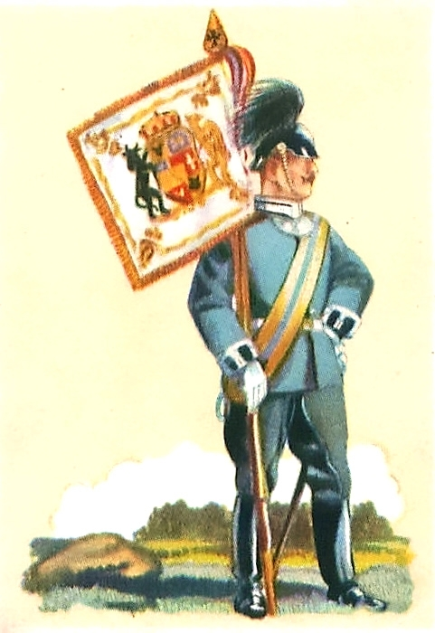 Standarte des 2. Großherzoglich Mecklenburgischen Dragoner-Regiments Nr. 18